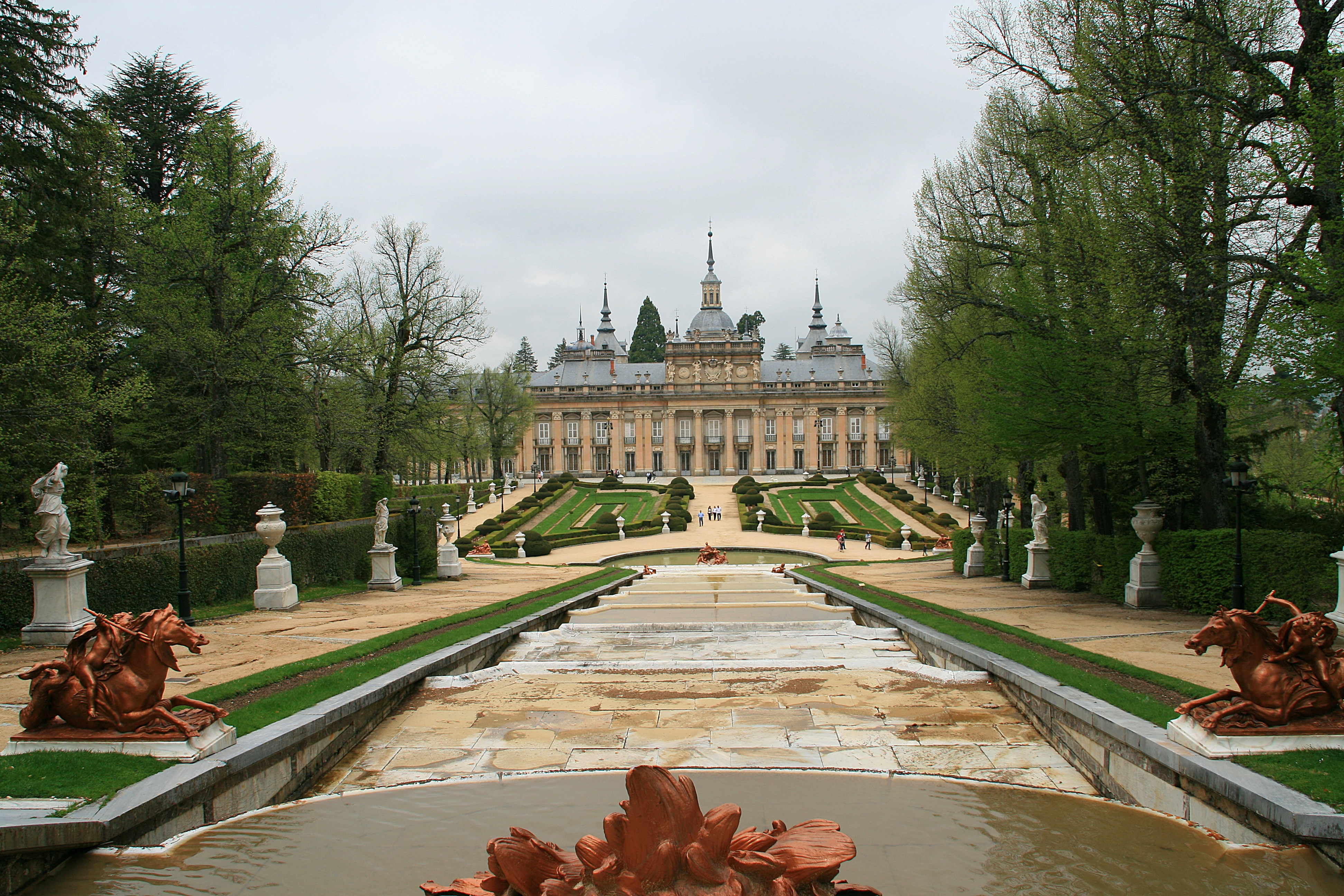 El Real Sitio de La Granja está situado en la vertiente norte de la sierra del Guadarrama, a unos 90 kilómetros de Madrid. Su nombre proviene de una antigua granja que los monjes jerónimos del monasterio segoviano de El Parral tenían aquí. Felipe V se retiró a este lugar en 1724 y durante los veinte años siguientes engrandeció los jardines y el palacio, que fue usado como residencia de verano por todos sus sucesores hasta Alfonso XIII. Recientemente, se han acometido trabajos de restauración y de reordenación de las colecciones en los Salones Oficiales que nos permiten volver a la época de Felipe V. Son de gran interés las bóvedas pintadas al fresco, los cuadros y el mobiliario de los siglos XVIII y XIX. Los jardines son uno de los mejores ejemplos que hoy se conservan de los jardines del siglo XVIII, realizado por el arquitecto francés René Carlier; está formado con parterres y bosquetes delimitados con paredes de vetación formadas con carpe, y alineaciones de árboles, en especial tilos y castaños de Indias. En el siglo XIX se introdujeron nuevas especies, sobre todo coníferas como las monumentales sequoias, plantadas ante la Real Colegiata, en los jardines del Medio Punto. Estatuas de mármol blanco, y jarrones del siglo XVIII, decoran los parterres y avenidas del jardín, que se completan con grandiosas esculturas en las fuentes, en plomo pintado imitando bronce. Destacan las de Neptuno, Apolo y Andrómeda en la amplia perspectiva de las Carreras de Caballos; la Cascada de Anfítride, ante el Palacio; y las de las Ocho Calles, el Canastillo, los Baños de Diana y la Fama. El agua que alimenta sus surtidores llega desde un gran depósito llamado El Mar, situado por encima de la zona ajardinada. Por la fuerza de la gravedad, como en el siglo XVIII, el agua de algunos surtidores alcanza los 40 metros de altura, como el de la fuente de la Fama.